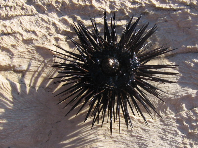 Black sea urchin Arbacia lixula